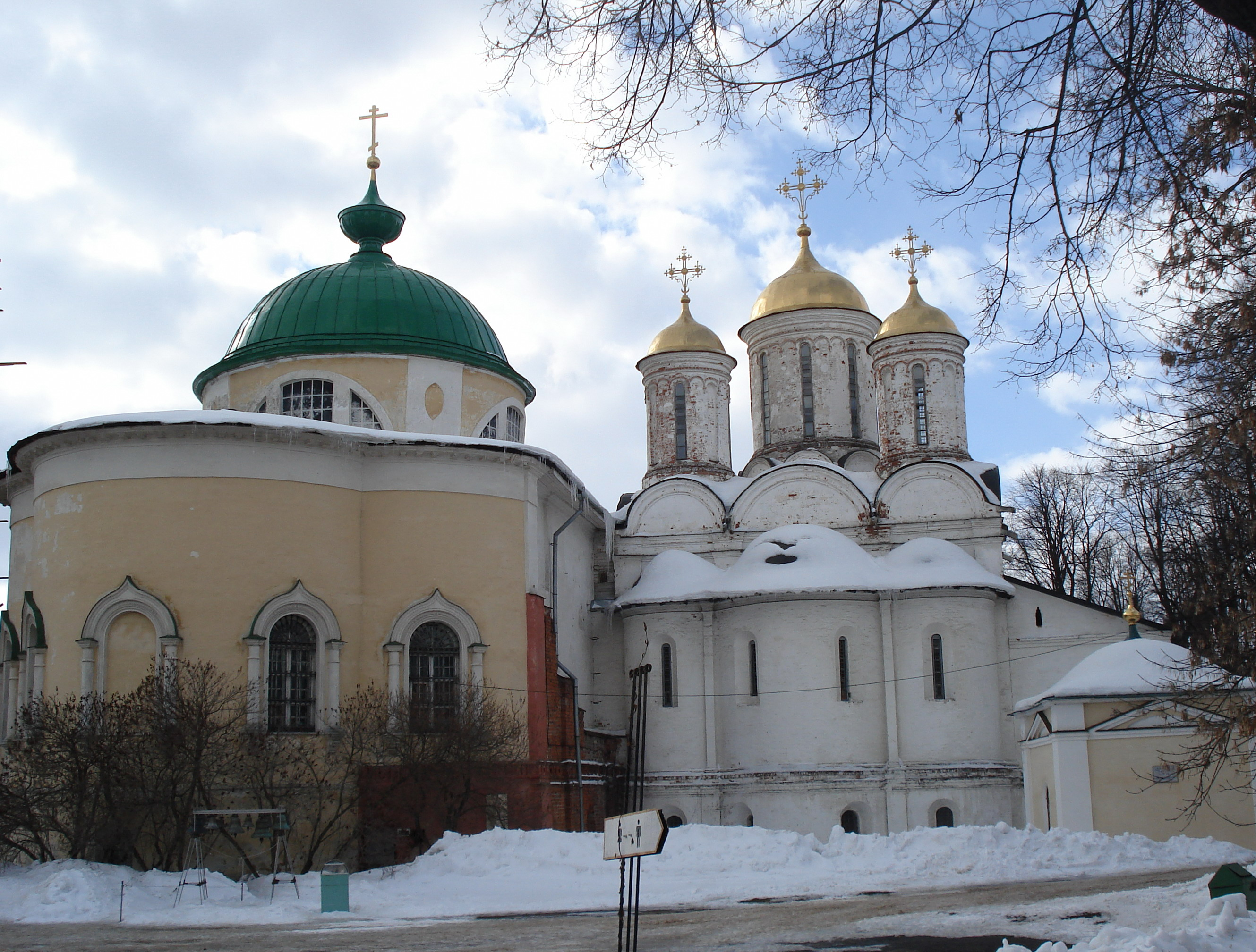 Спасо-Преображенский собор (справа) и Церковь ярославских чудотворцев (слева) в Спасском монастыре Ярославля